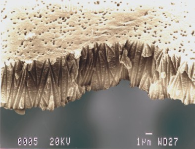 разрешен­ие OTRS|2012073110005081